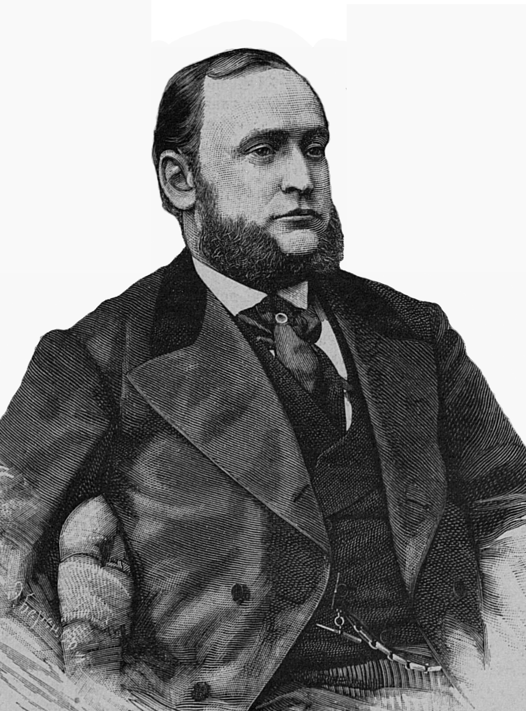 Кросс Густав Густавович, пианист